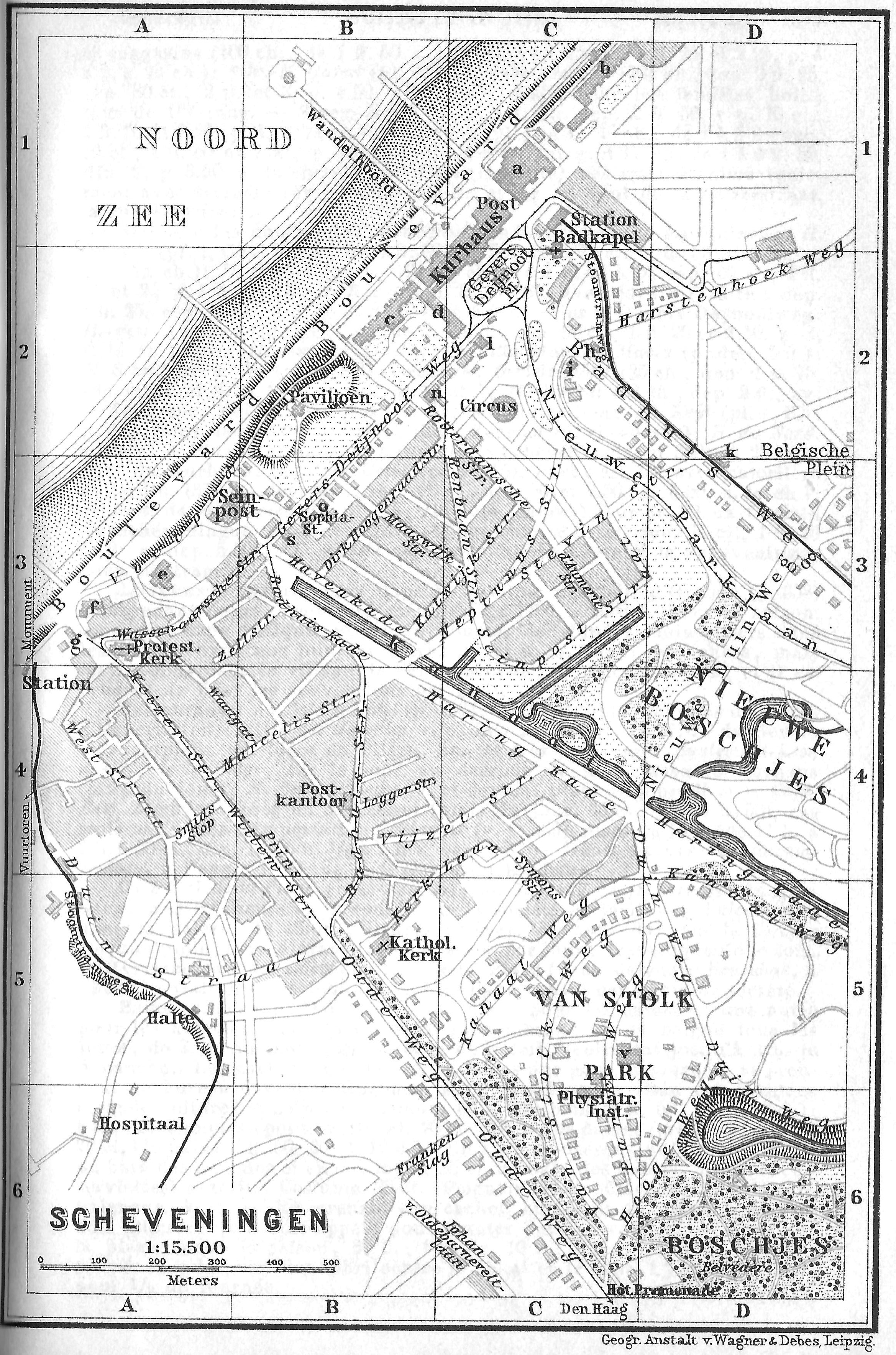 Detailkaart Scheveningen 1905